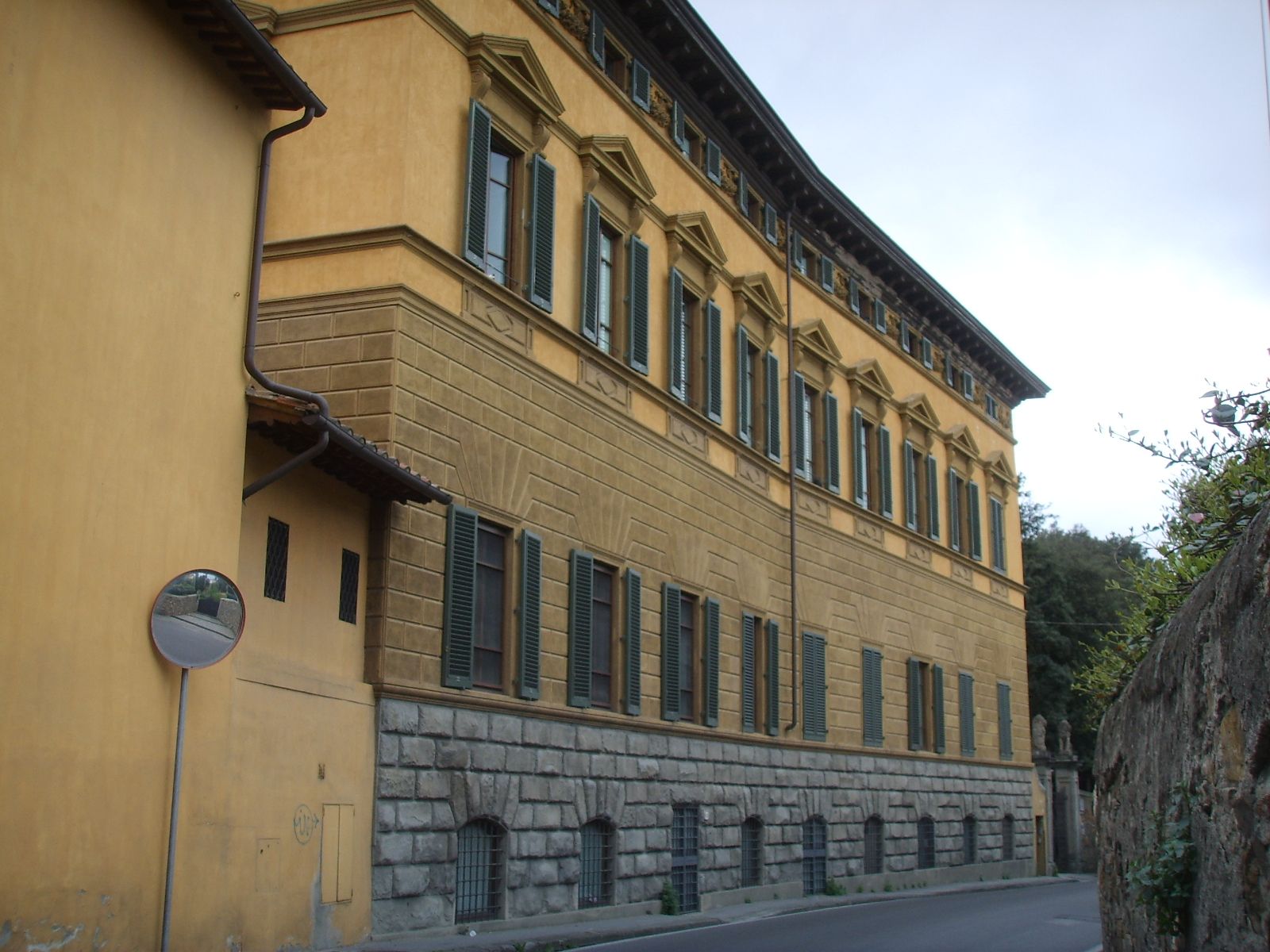 Villa natalia